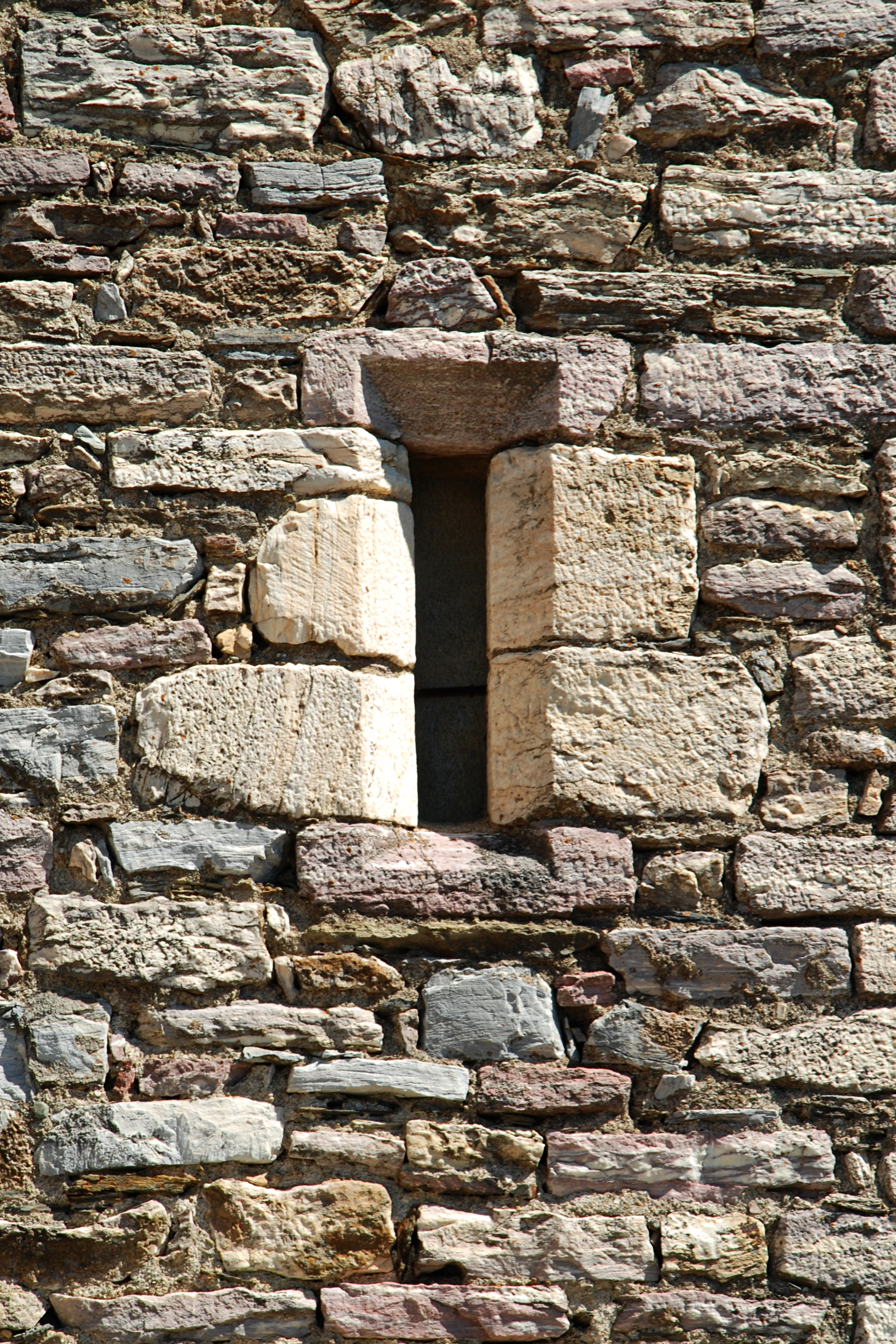 France - Languedoc - Hérault - Olargues - Église Saint-Laurent .